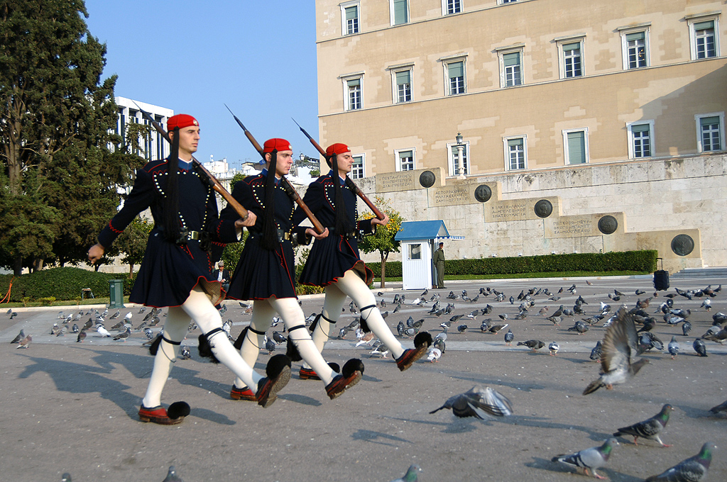 evzonoi